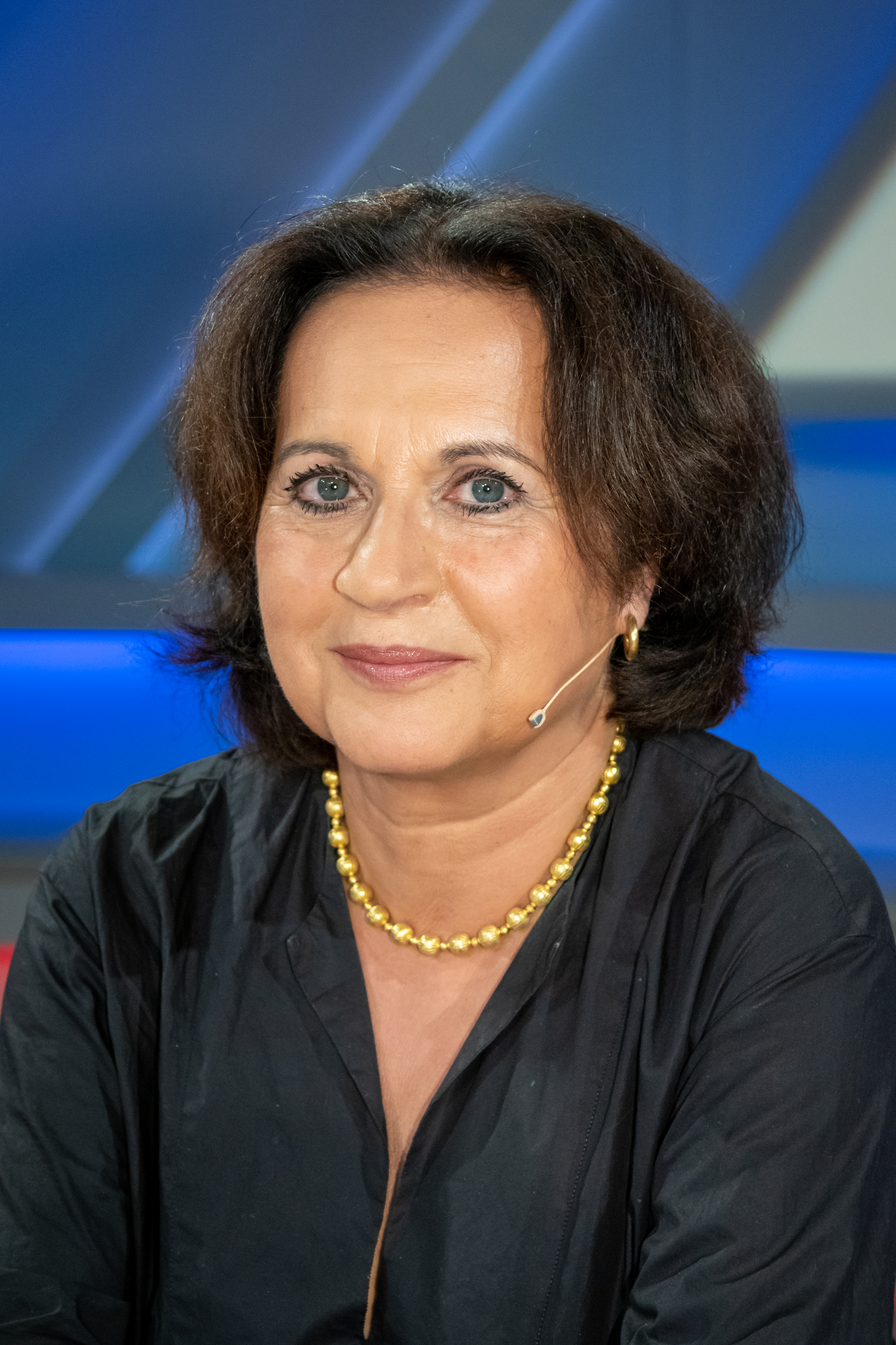 Ferdos Forudastan in der WDR-Sendung "maischberger. die woche" am 2019-10-23